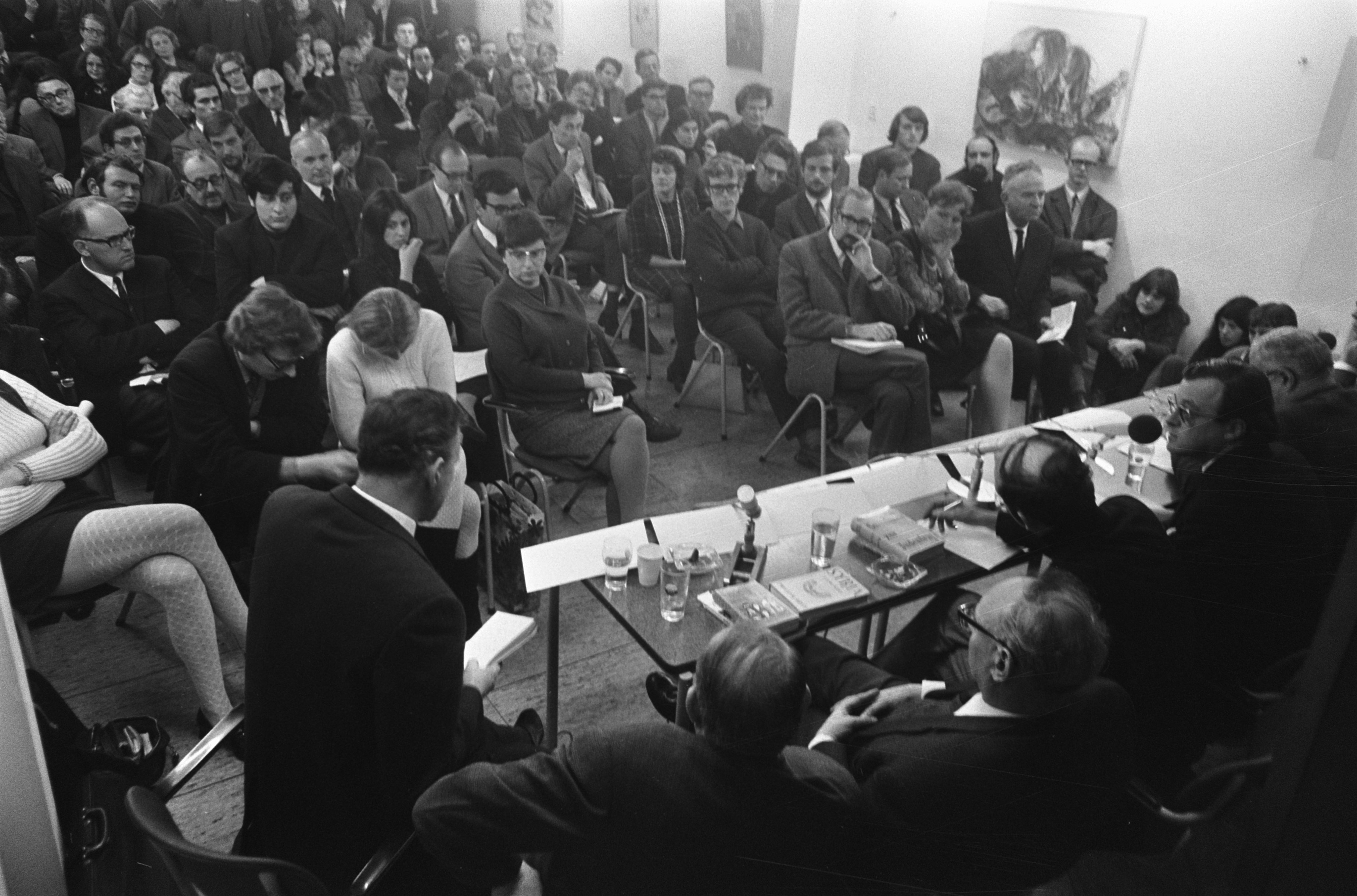 Collectie / Archief : Fotocollectie Anefo Reportage / Serie : [ onbekend ] Beschrijving : Forum over anti-zionisme en anti-semitisme in het Anne Frank huis Amsterdam. Datum : 22 december 1969 Locatie : Amsterdam, Noord-Holland Trefwoorden : fora, forumleden Fotograaf : Mieremet, Rob / Anefo Auteursrechthebbende : Nationaal Archief Materiaalsoort : Negatief (zwart/wit) Nummer archiefinventaris : bekijk toegang 2.24.01.05 Bestanddeelnummer : 923-1015